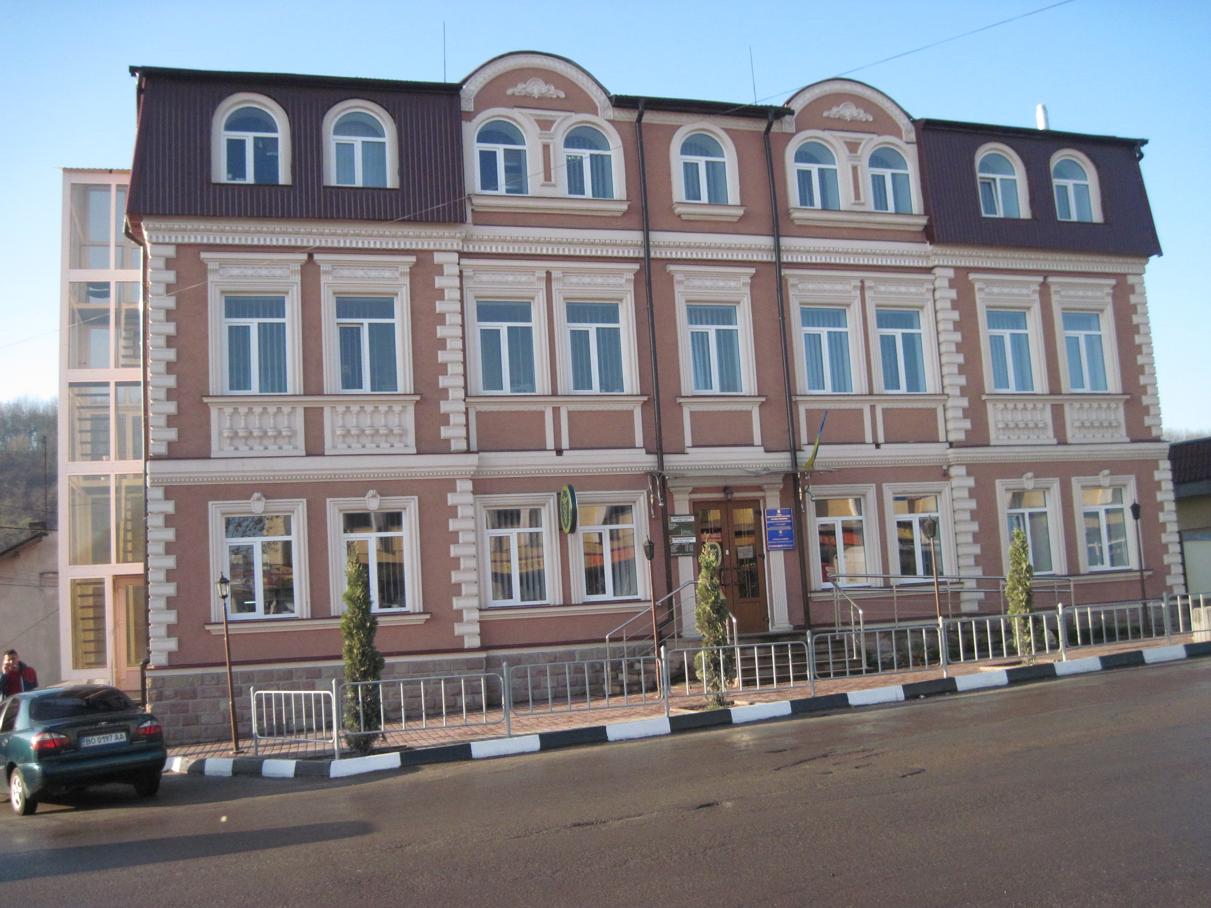 Вул. Галицька, 11, ДПІ. Бучач. 2013